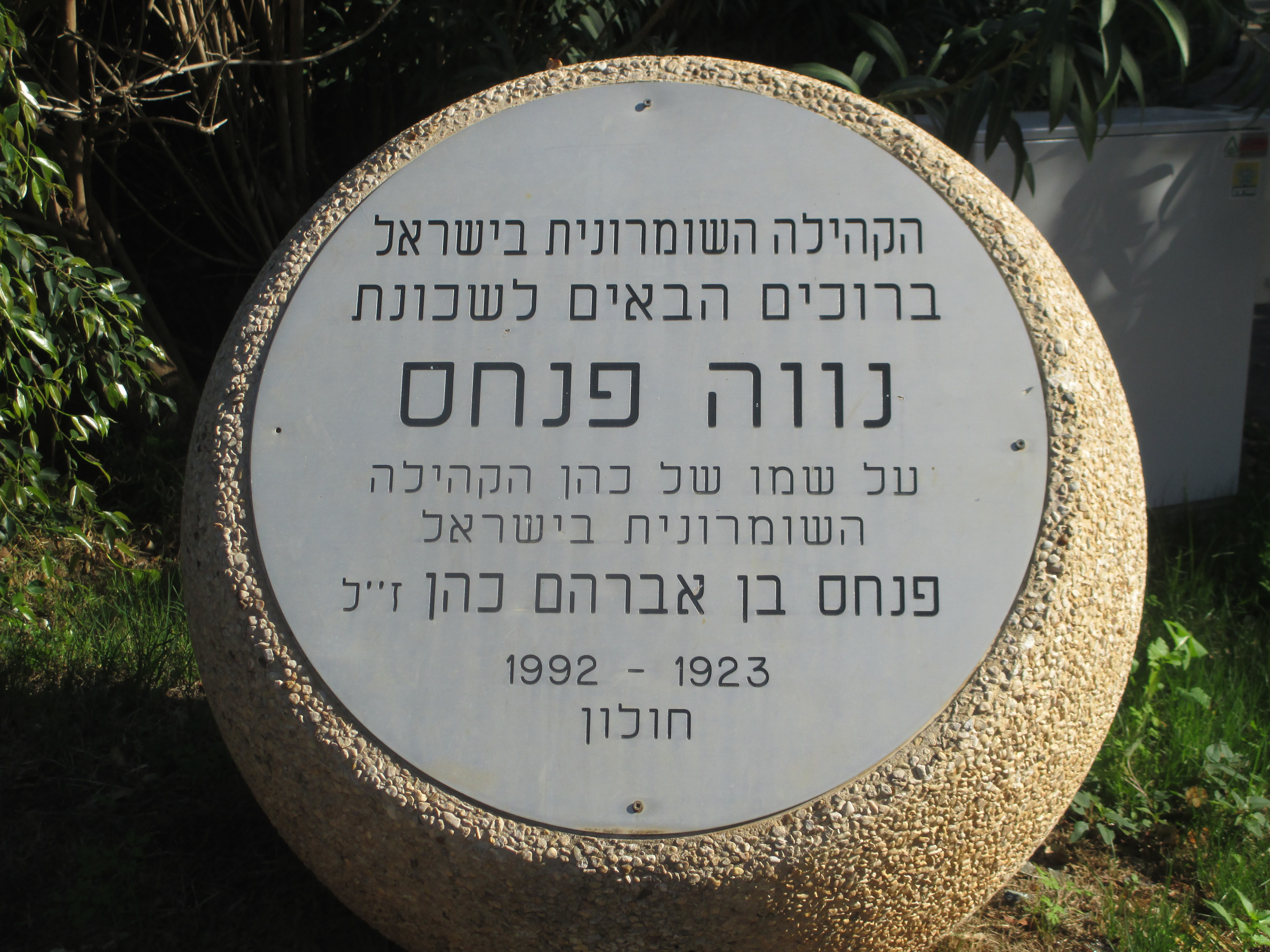 שכונת השומרונית נווה פנחס בחולון